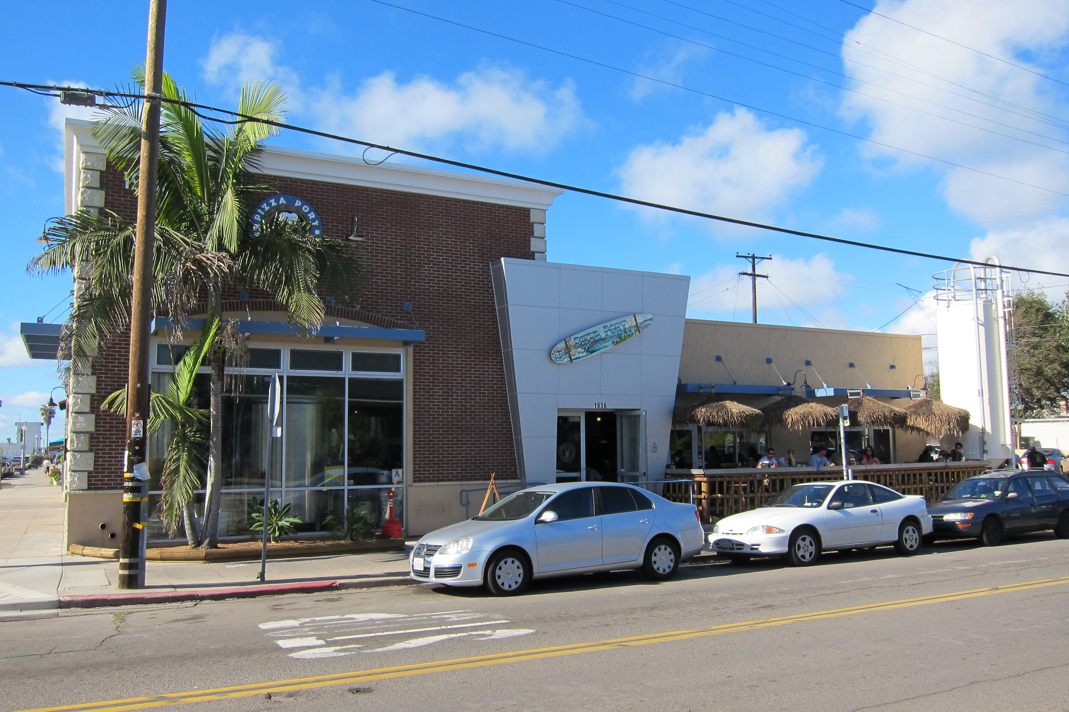 in